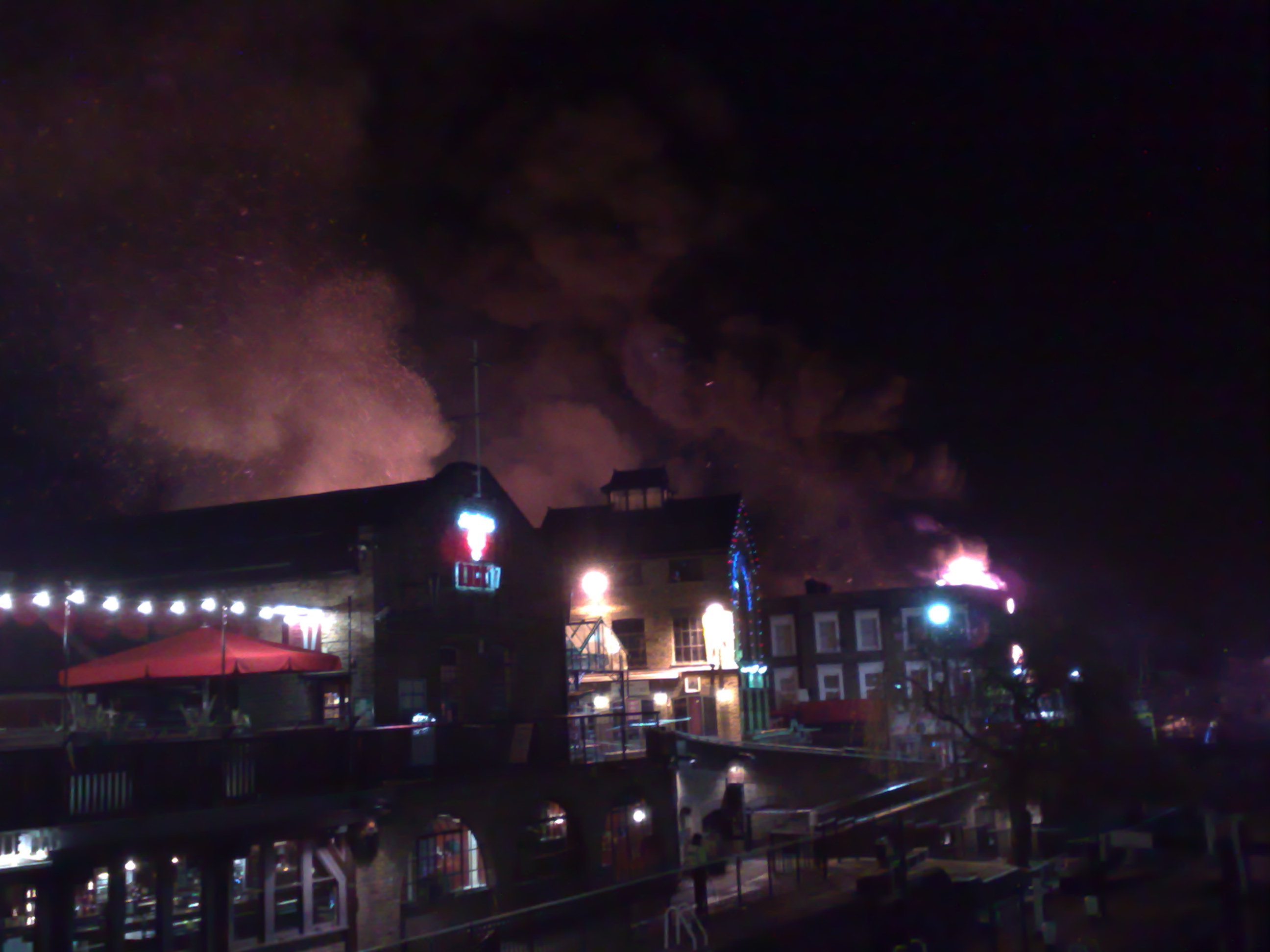 camdem market fire